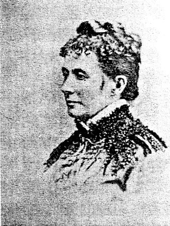 ジェームス・ハミルトン・バラ宣教師の妻マーガレット